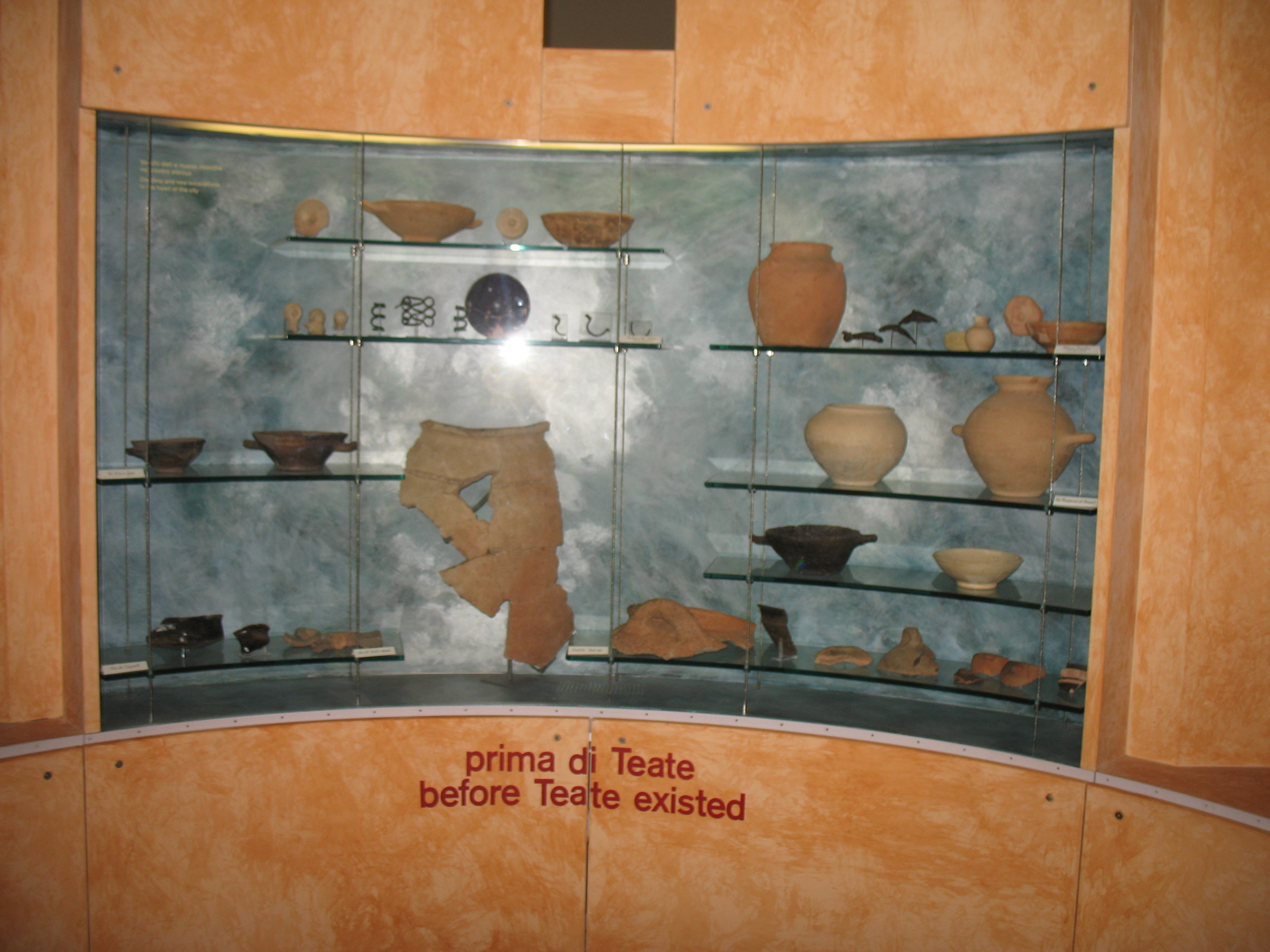 Reperti custoditi nel Museo La Civitella di Chieti